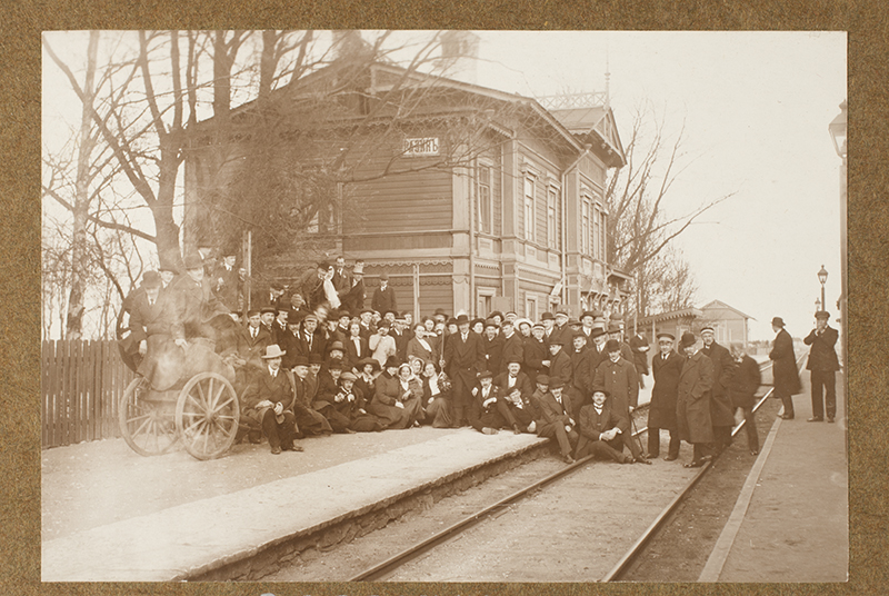 Tartu Eesti üliõpilaste Tallinna reis Murueide tütre etendusele, Raasiku 1914